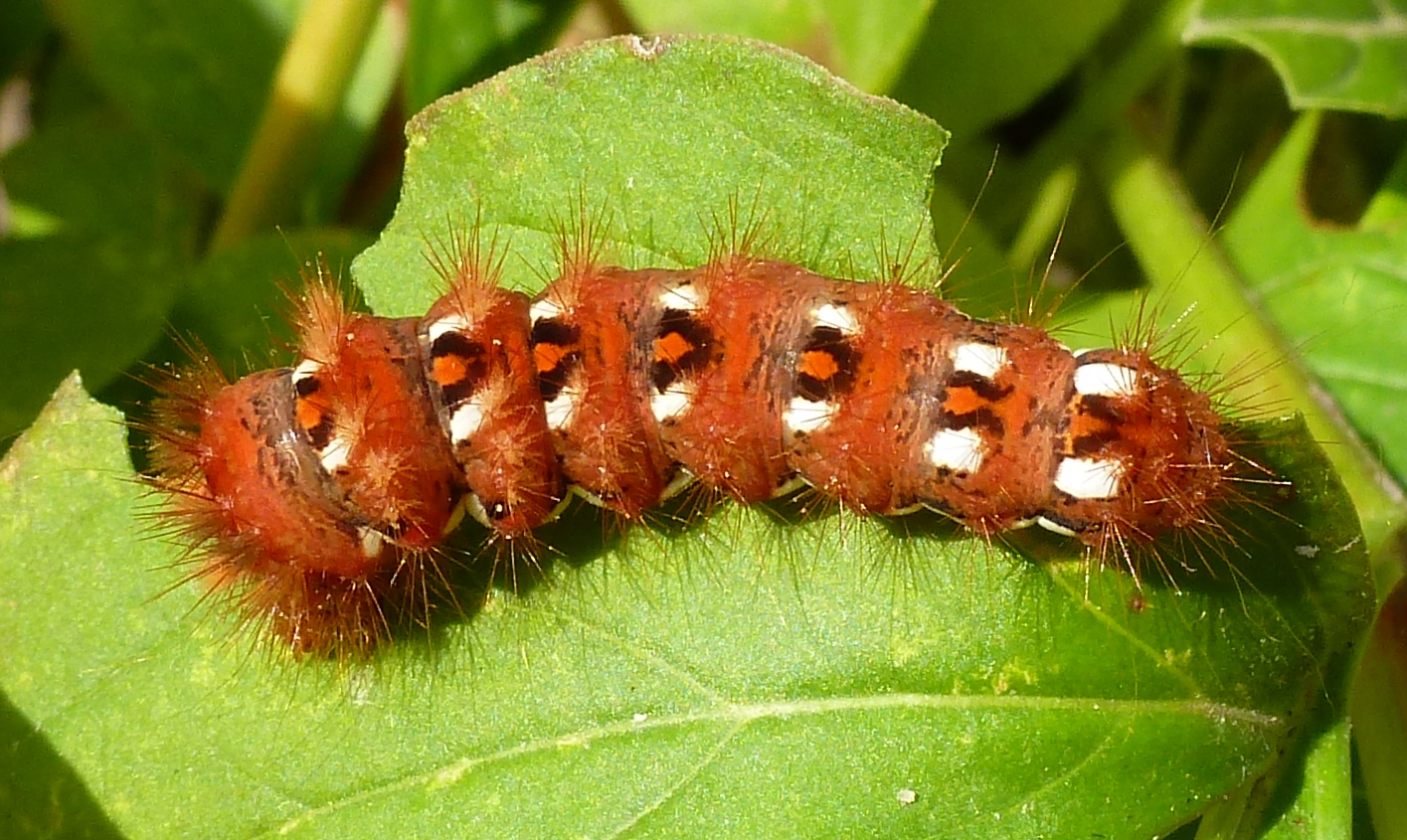 Raupe der Ampfer-Rindeneule, Elsass